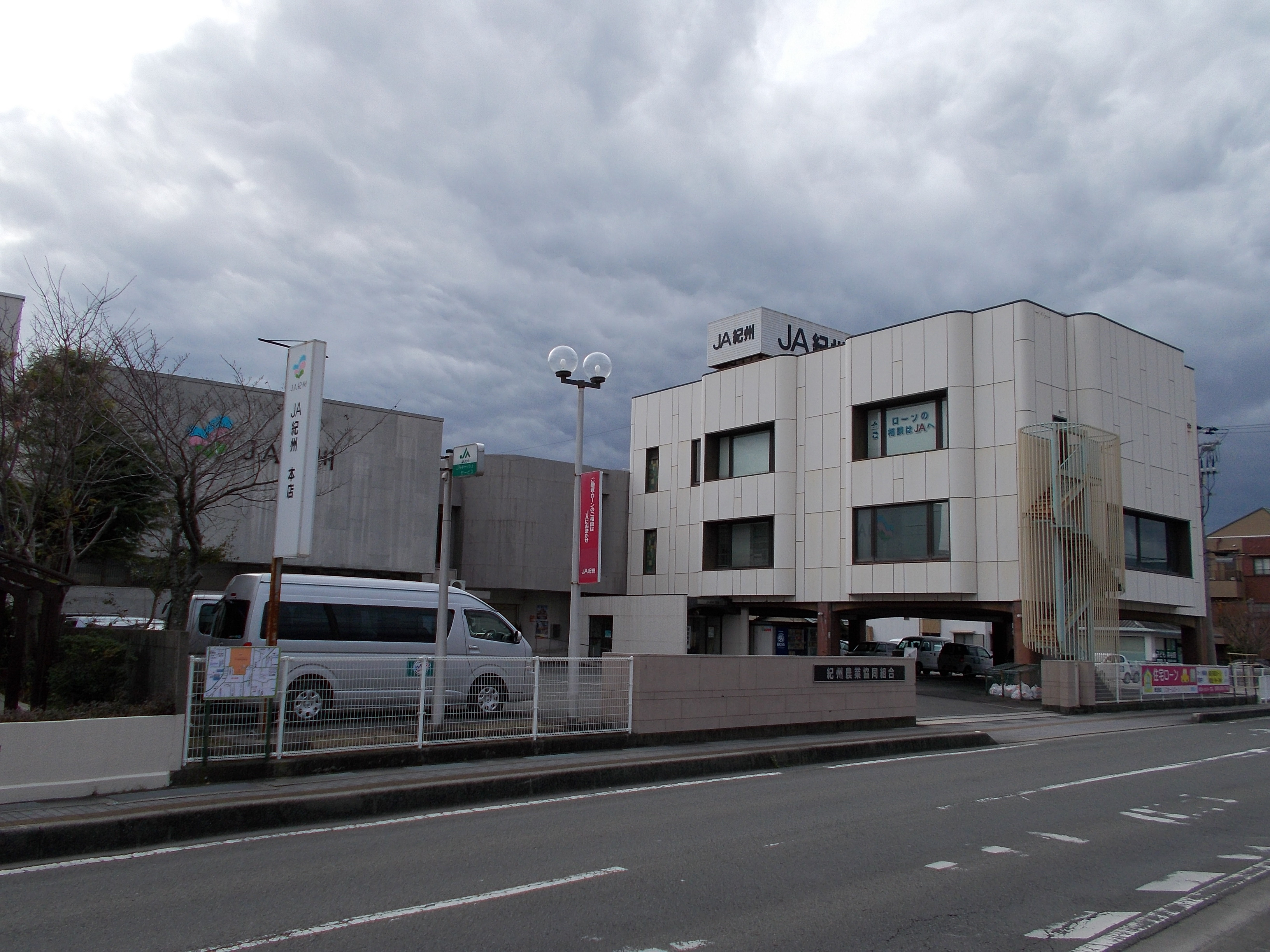 紀州農業協同組合